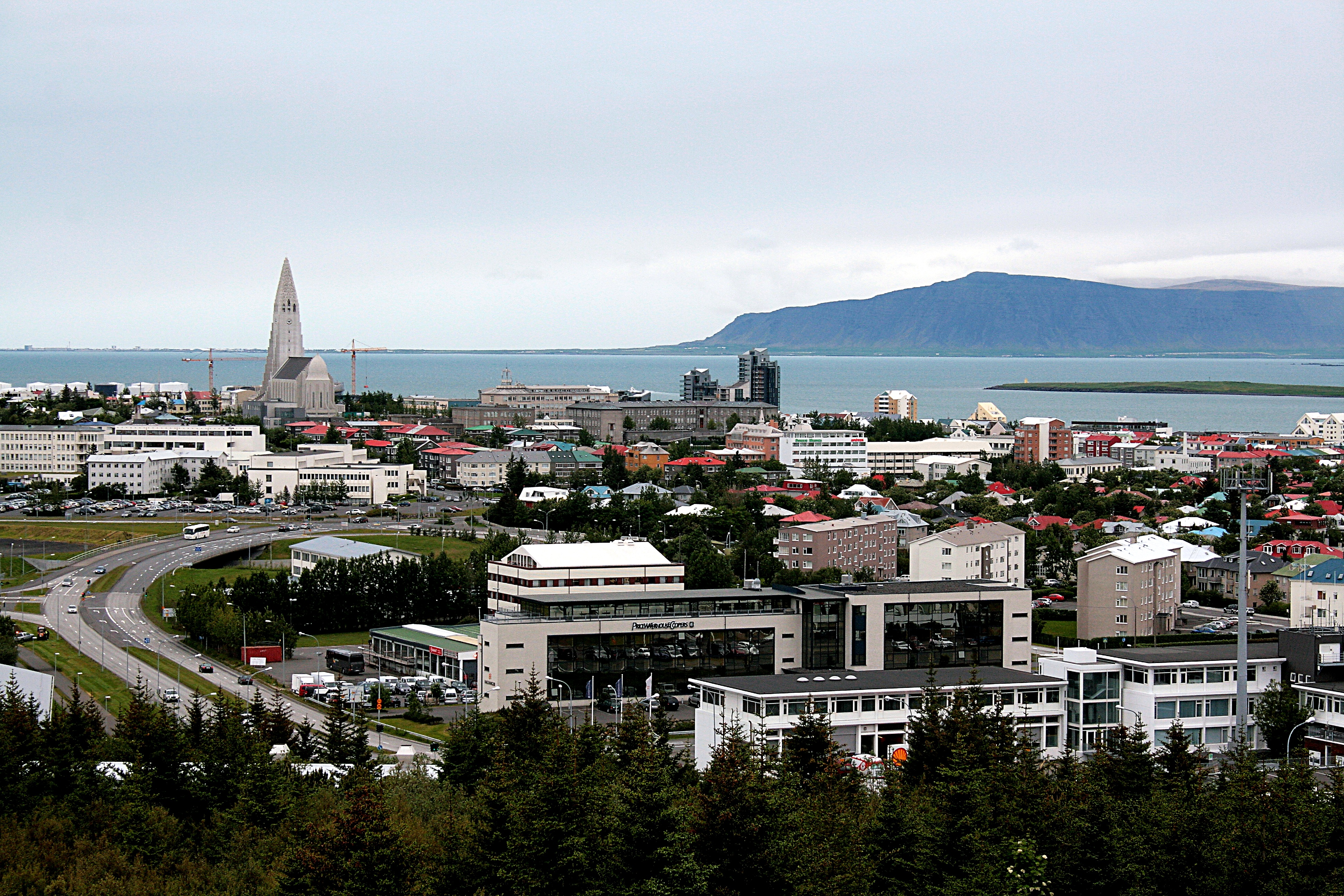 Reykjavík